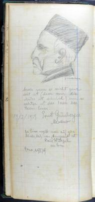 דיוקן של פינס